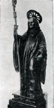 Escultura de Sant Benet és una obra de gran qualitat que es trobava a la sagristia parroquial de Sant Feliu de Guíxols i que s'atribueix a Domènec Rovira.